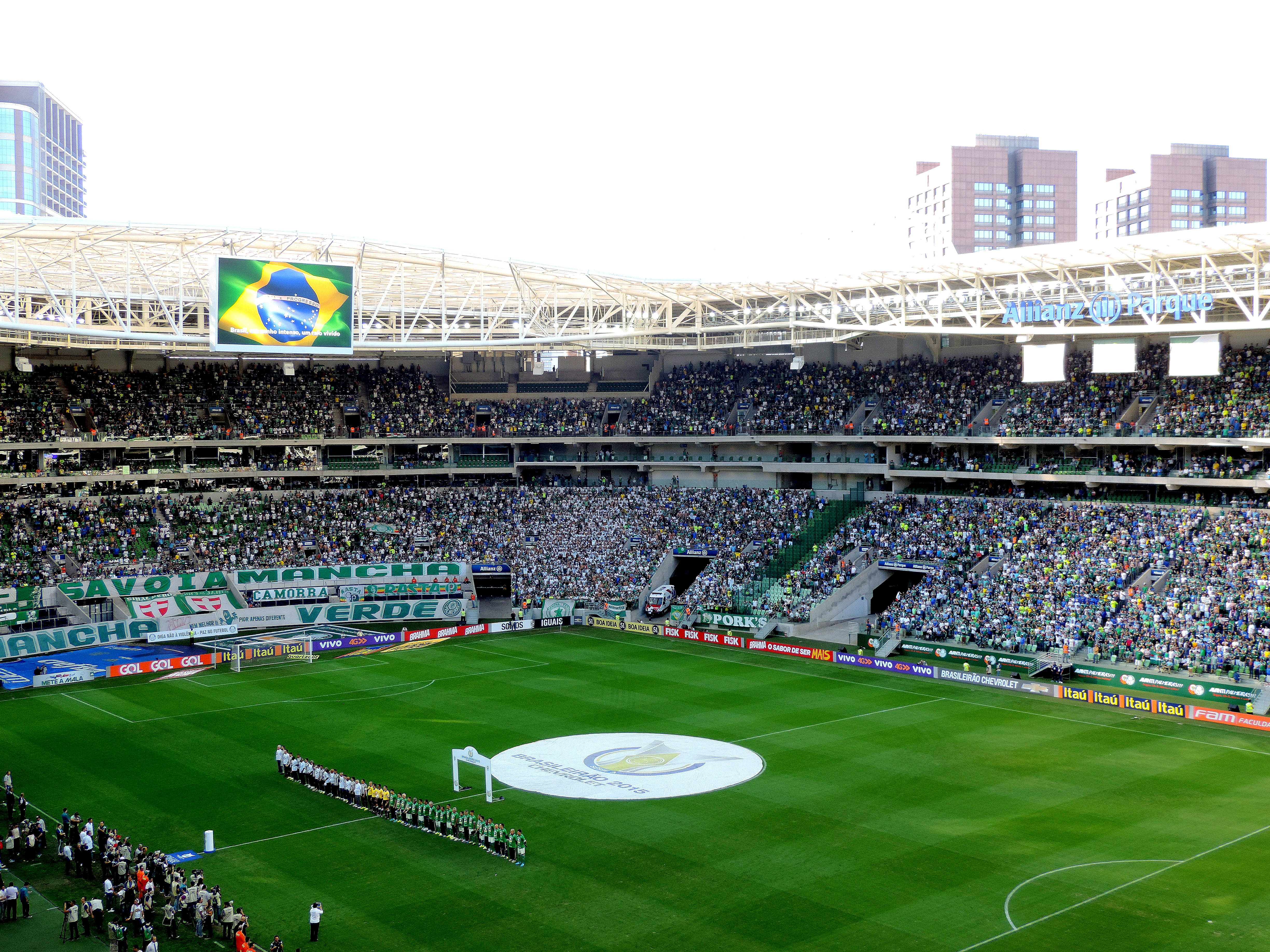 Foto: Roberto Sabino